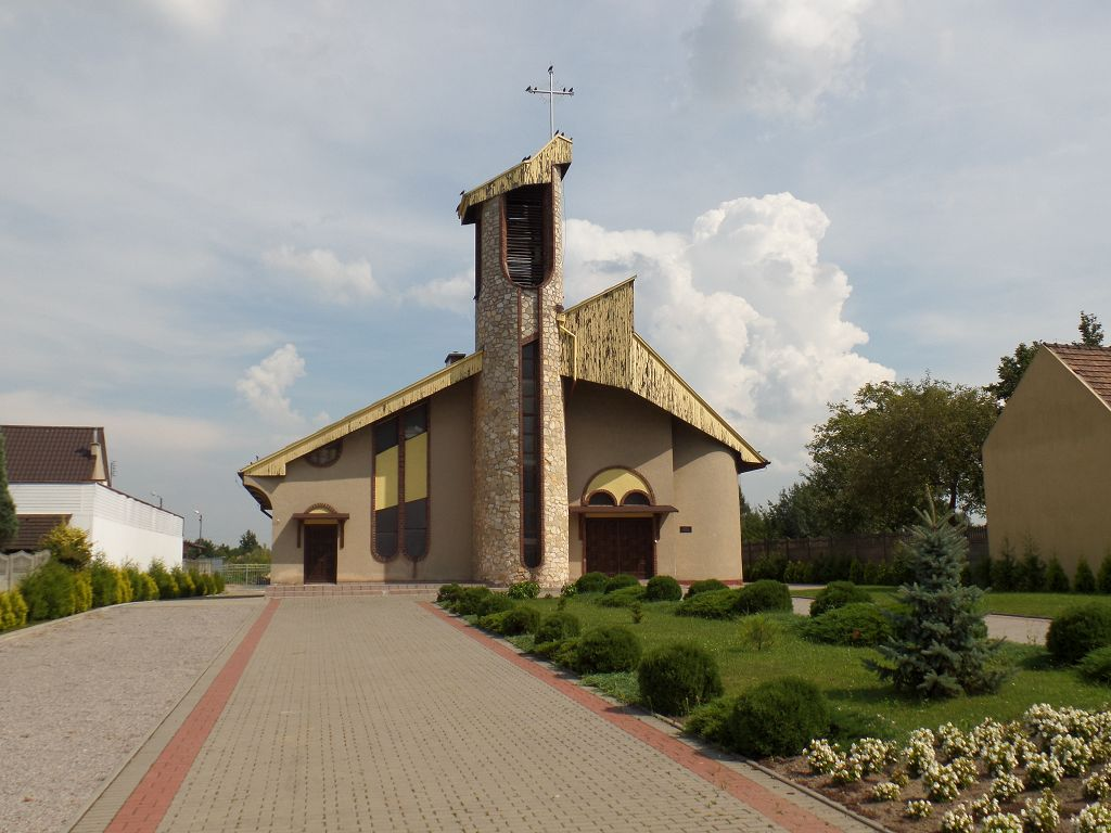 Kościół w Pyrzowicach